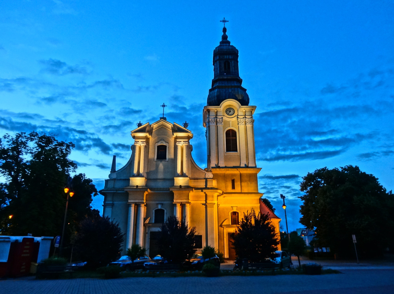 Kościół rzymskokatolicki p.w. św. Mikołaja w Bydgoszczy-Fordonie